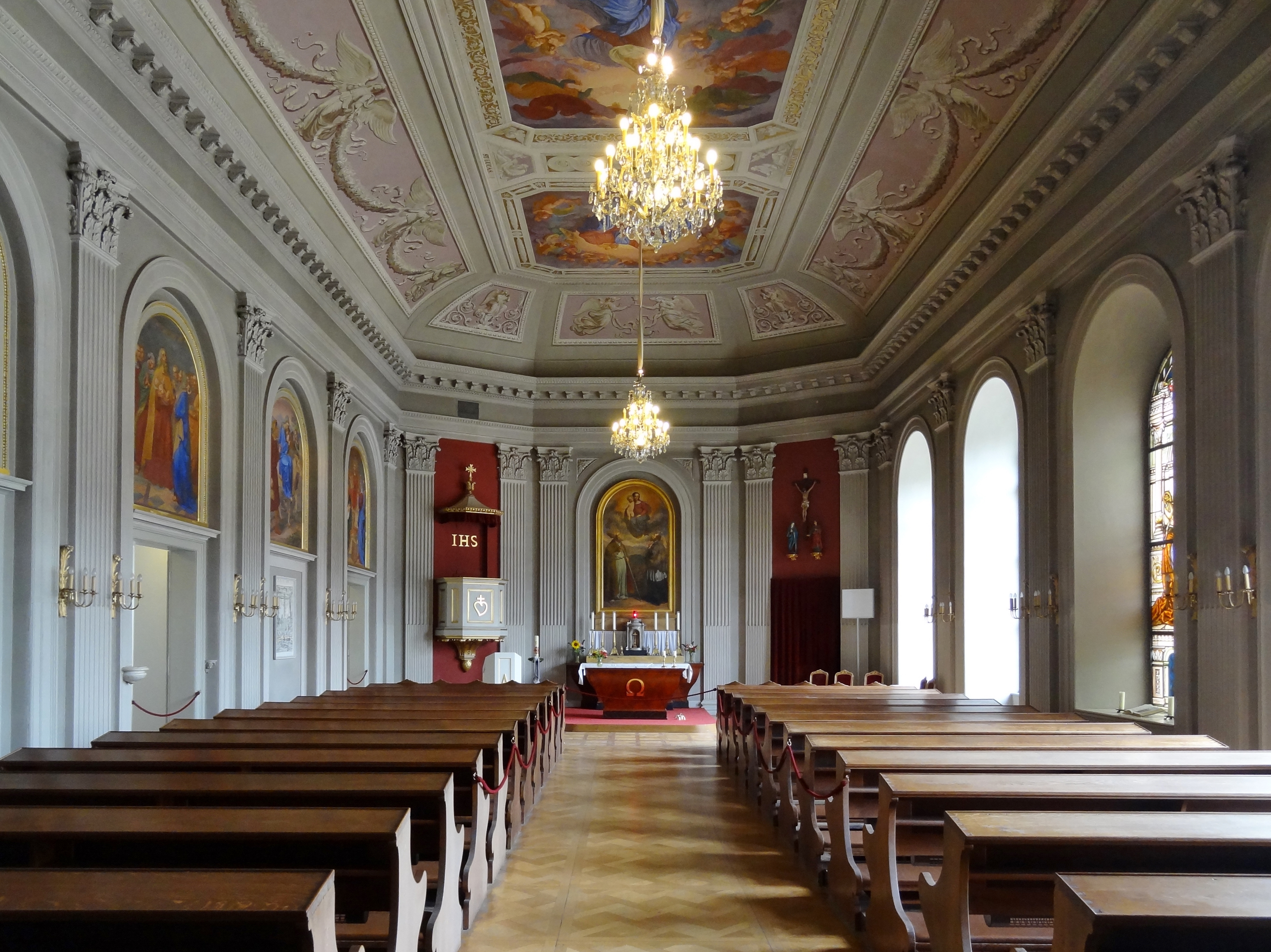 Katholische Schlosskapelle im Nordostflügel des Neuen Palais des Schlosses Pillnitz, Sachsen, Deutschland